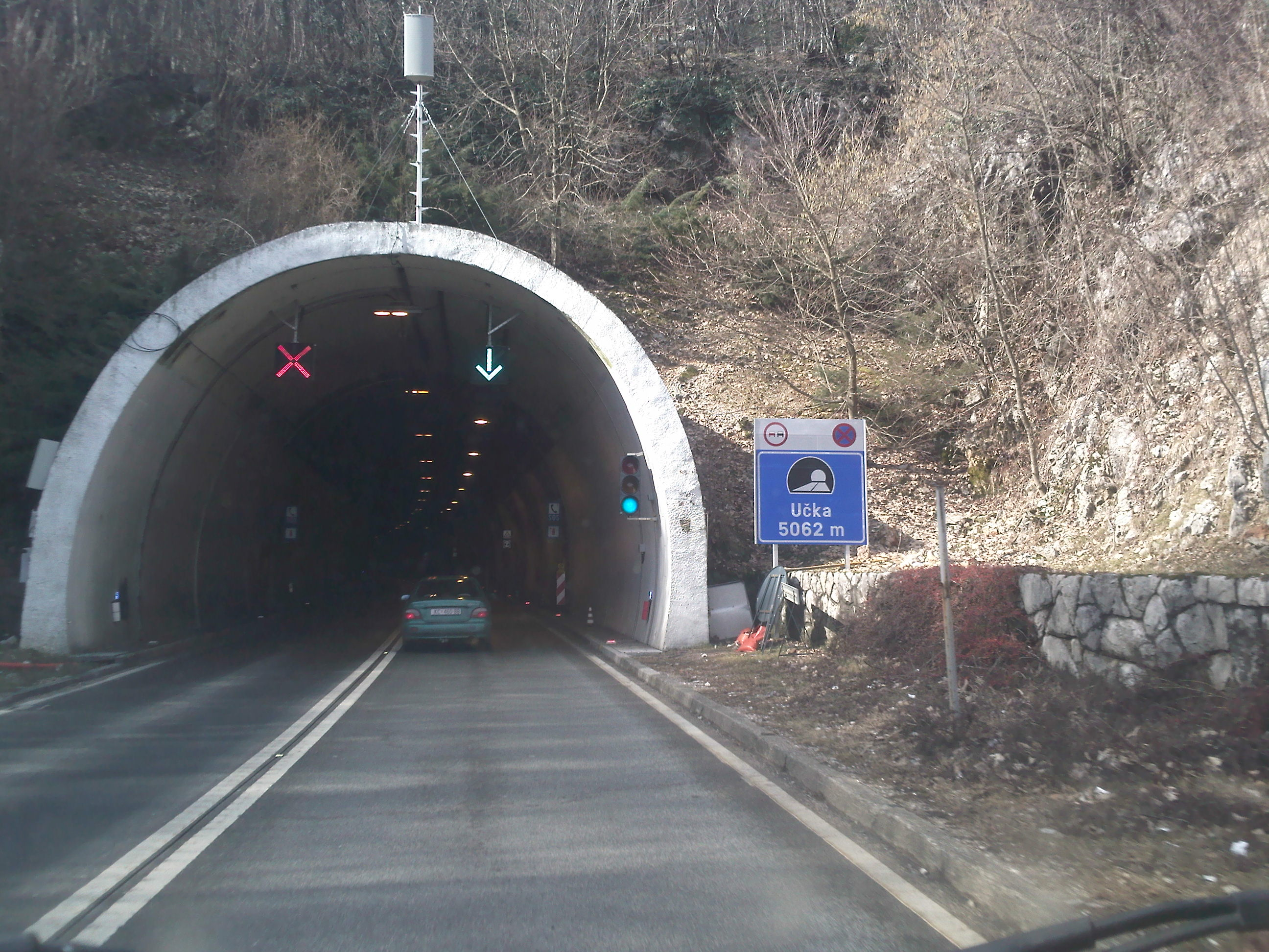 Ulaz u tunel Učku